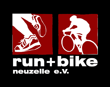 run-and-bike Neuzelle e.V.